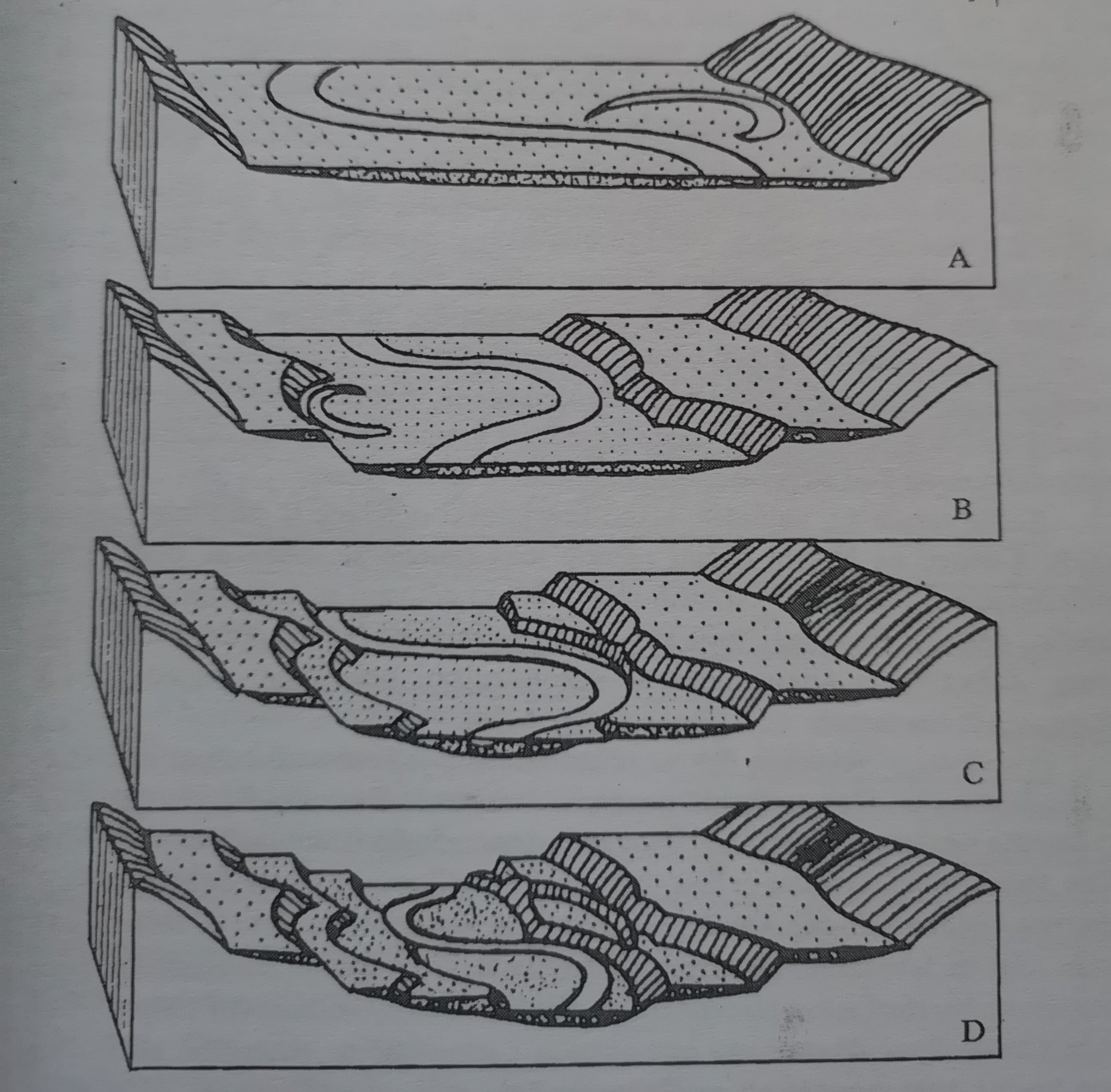 Усецање ерозивних речних тераса